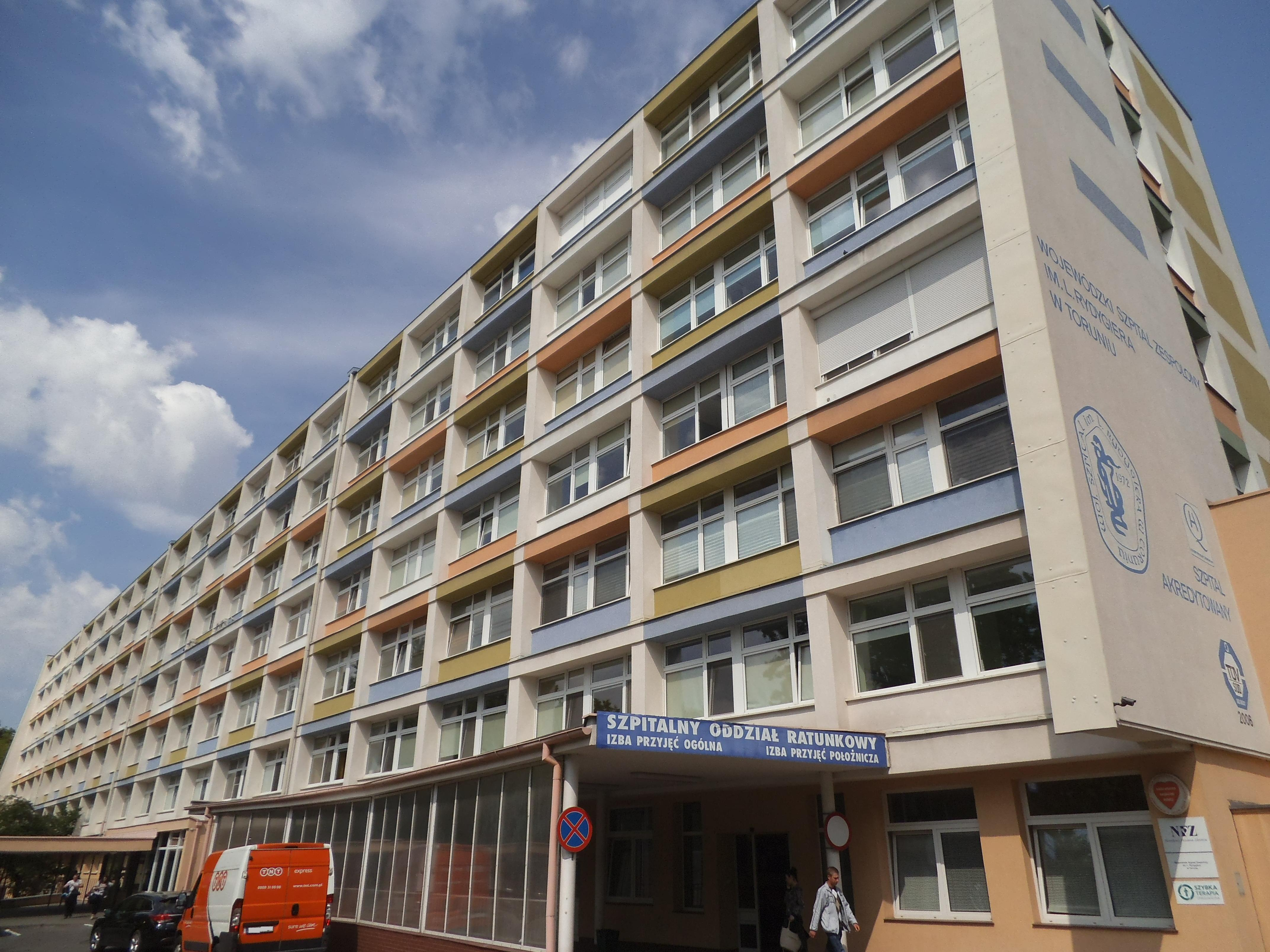 Wojewódzki szpital na Bielanach w Toruniu